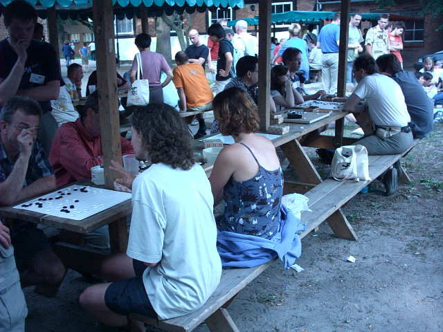 Europees Go Congres Tuchola 2004. Vriendschappelijke partijen.